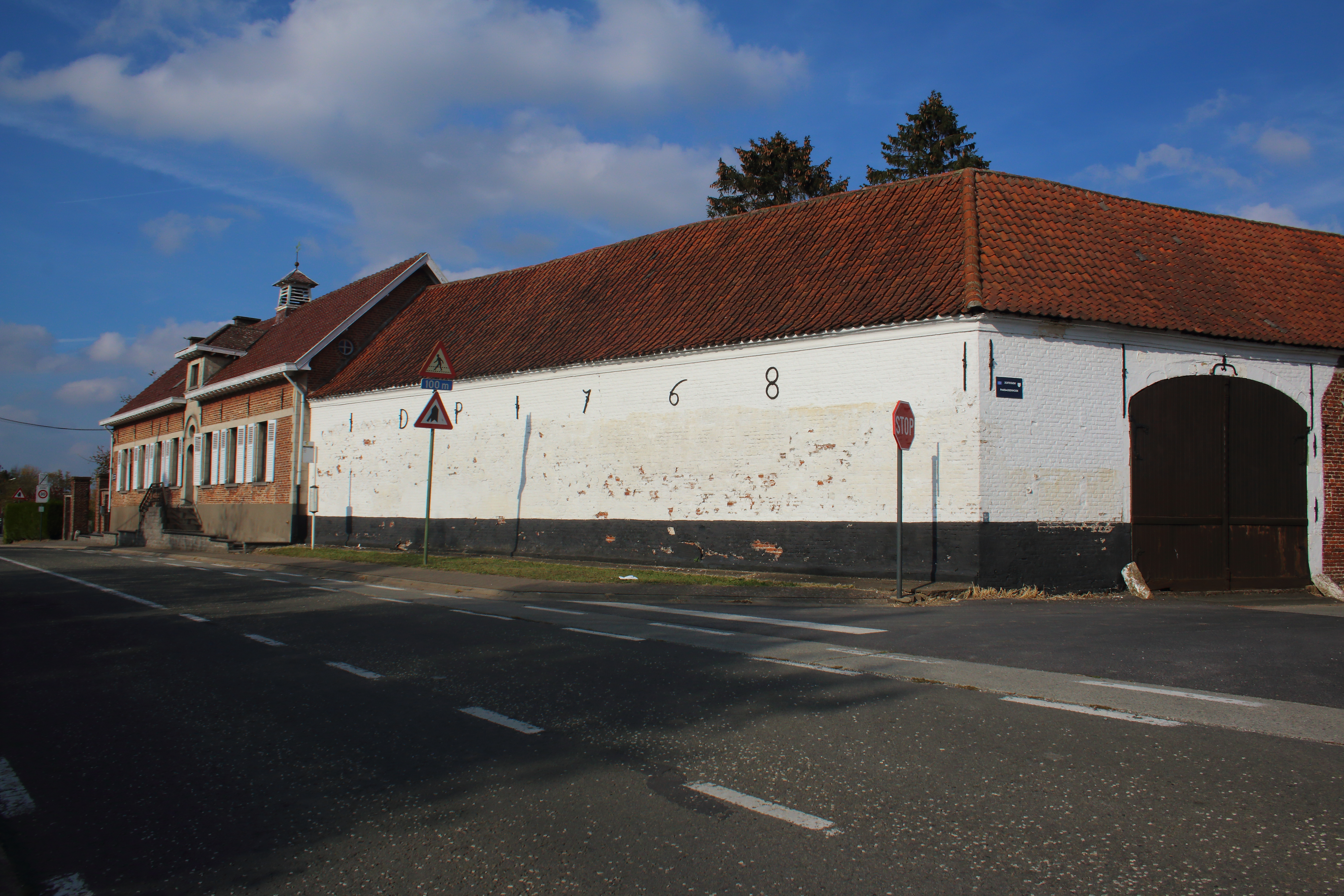 Afspanning De Posterij, Grotenberge, Zottegem, Vlaanderen, België